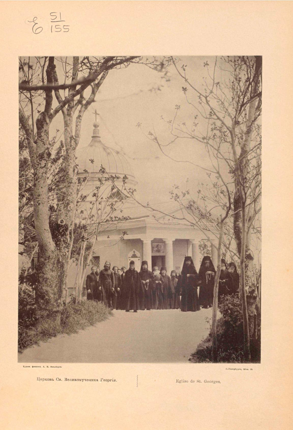 Альбом видов Георгиевского Балаклавского монастыря в Крыму